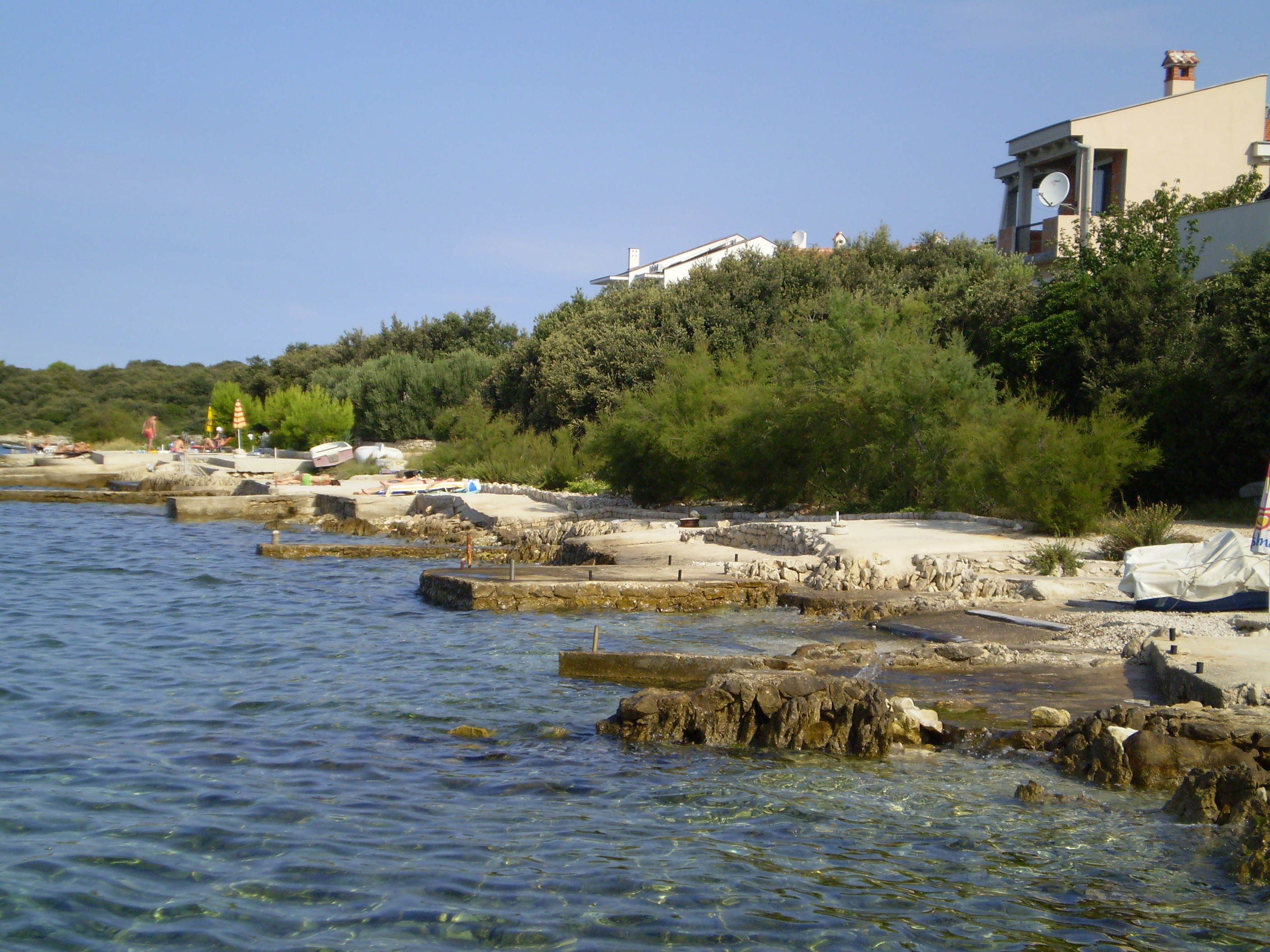 Kožino